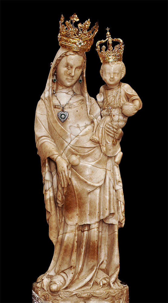 Ntra. Señora de los Milagros. Patrona de Palos de la Frontera